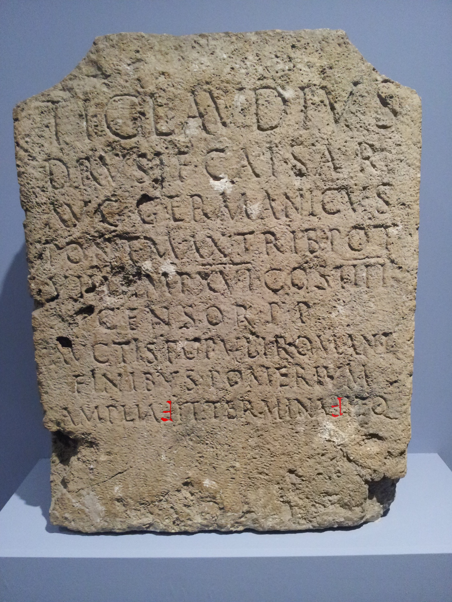 Cippe du pomerium de l’empereur Claude, un des points de bornage qui marquait l'extension du périmètre sacré de la ville de Rome. Cette borne est conservée à la Cité du Vatican sous le numéro d'inventaire 9268. Une lettre Claudienne (digamma inversé, ici en rouge - cliché numérique modifié) y transcrit la consonne V de ampliavit et terminavit.